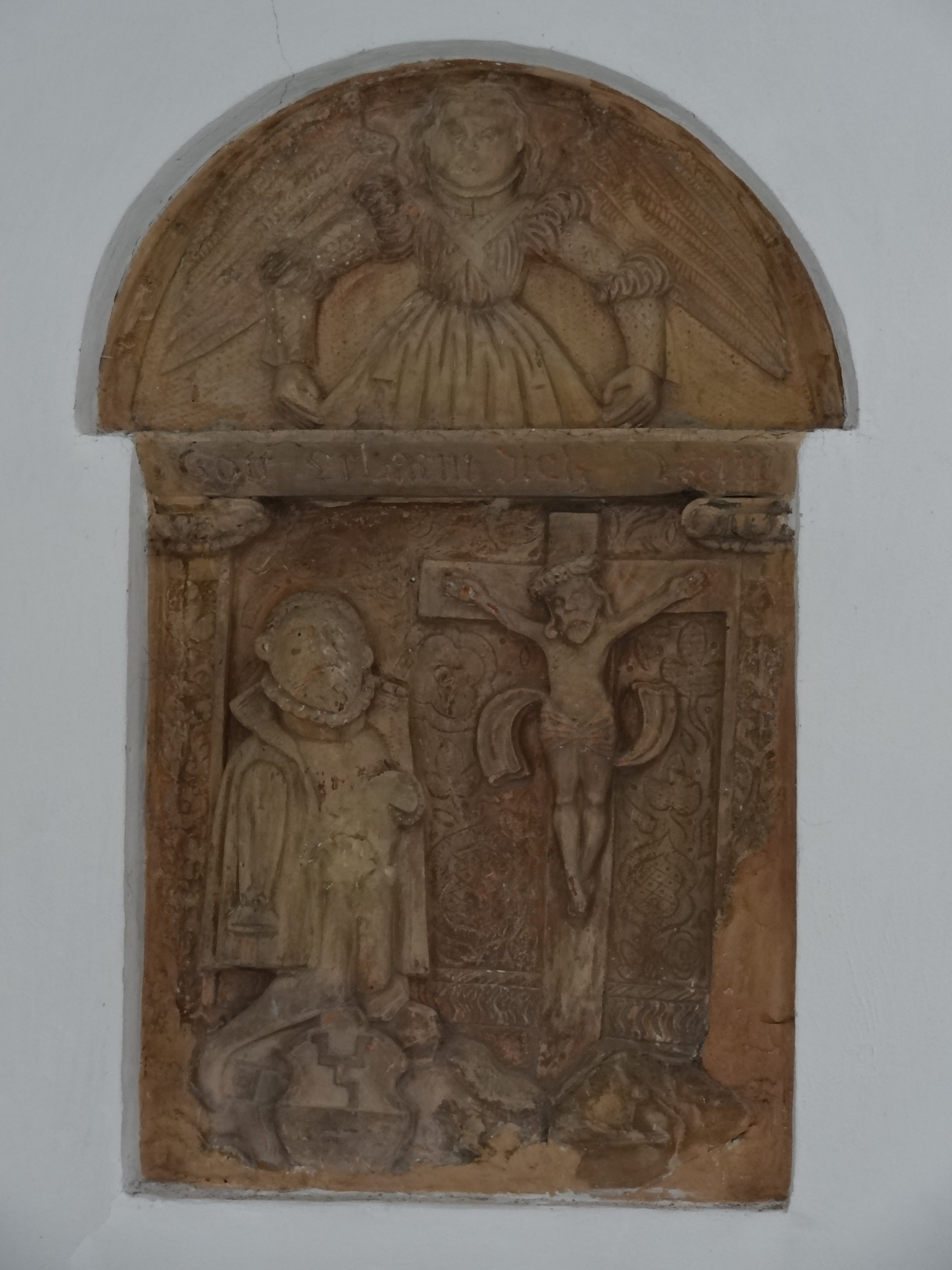 Evangelische Kirche Pohl-Göns